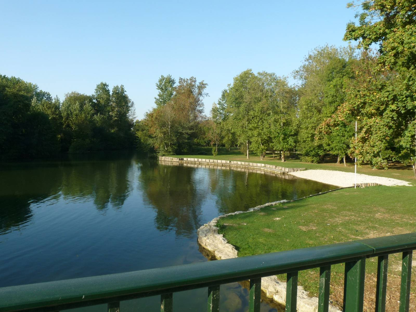 baignade sur la Charente, Vindelle (16), France